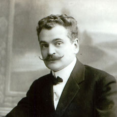 Аплаксин Андрей Петрович. 1879-1931 гг. Гражданский инженер, СПб Епархиальный архитектор